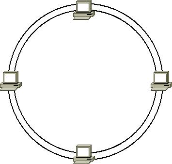 Rysunek topologii fizycznej podwójnego pierścienia, topologia sieci komputerowej.